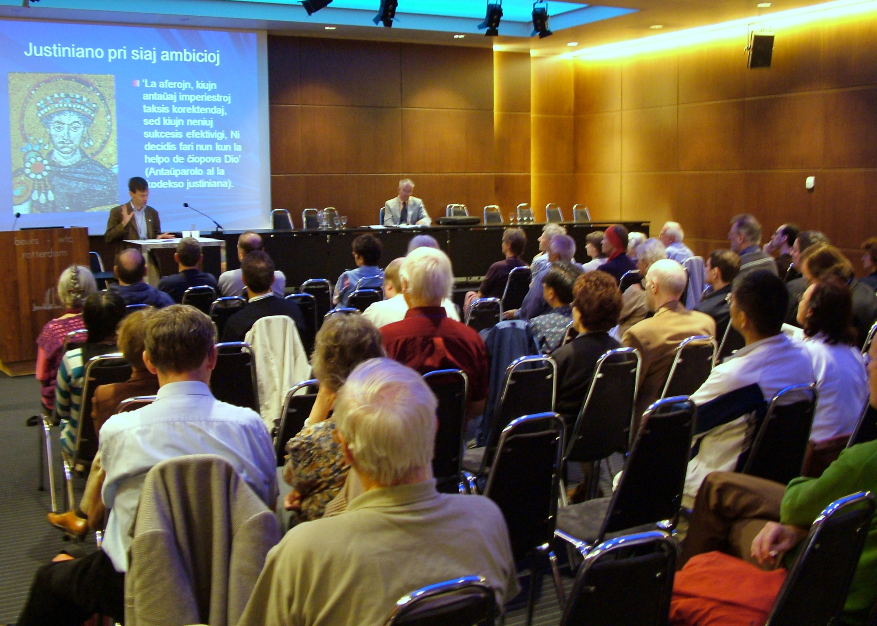 Universala Kongreso de Esperanto, Roterdamo 2008. IKU kun Geoffrey Greatrex.